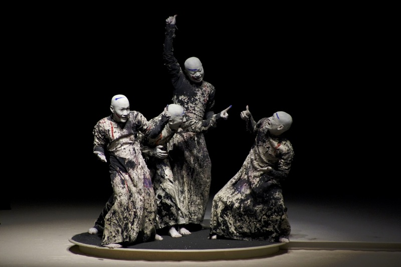 Espectáculo presentado en el Festival Cervantino llamada Kagemi: Más allá de la metáfora de los espejos, Sankai juku pertenece a la segunda generación de los grupos de la danza Butoh, movimiento que emergió en los años setenta como una expresión crítica de la conciencia humana.